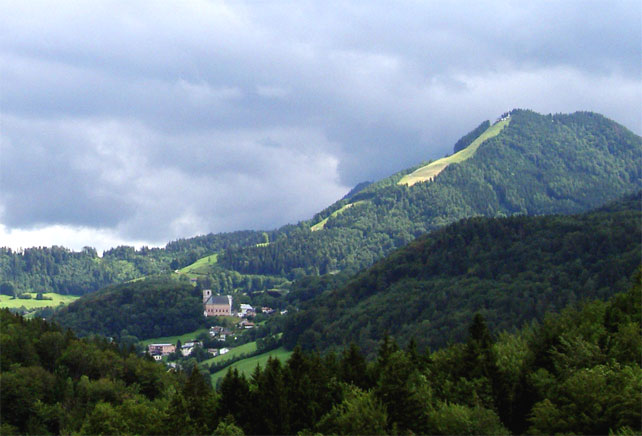 der Dürrnberg von den Barmsteinen aus gesehen